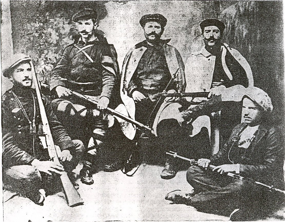 Никола Божков, Михаил Чаков, Христо Чернопеев, Панайот Байчев, Ангел Кайтазо в освободения Кавала, 1912.